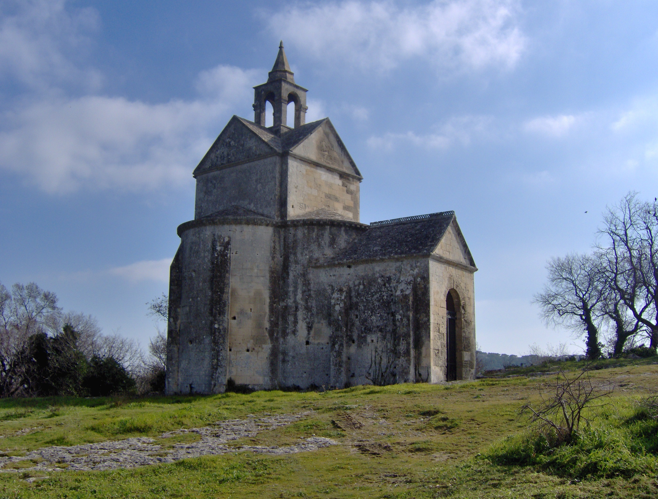 Arles (Bouches-du-Rhône_France), abbaye de Montmajour, en dehors de la clôture du monastère, chapelle Sainte-Croix où les pélerins venaient adorer un fragment de la Vraie Croix lors du Pardon de Montmajour.